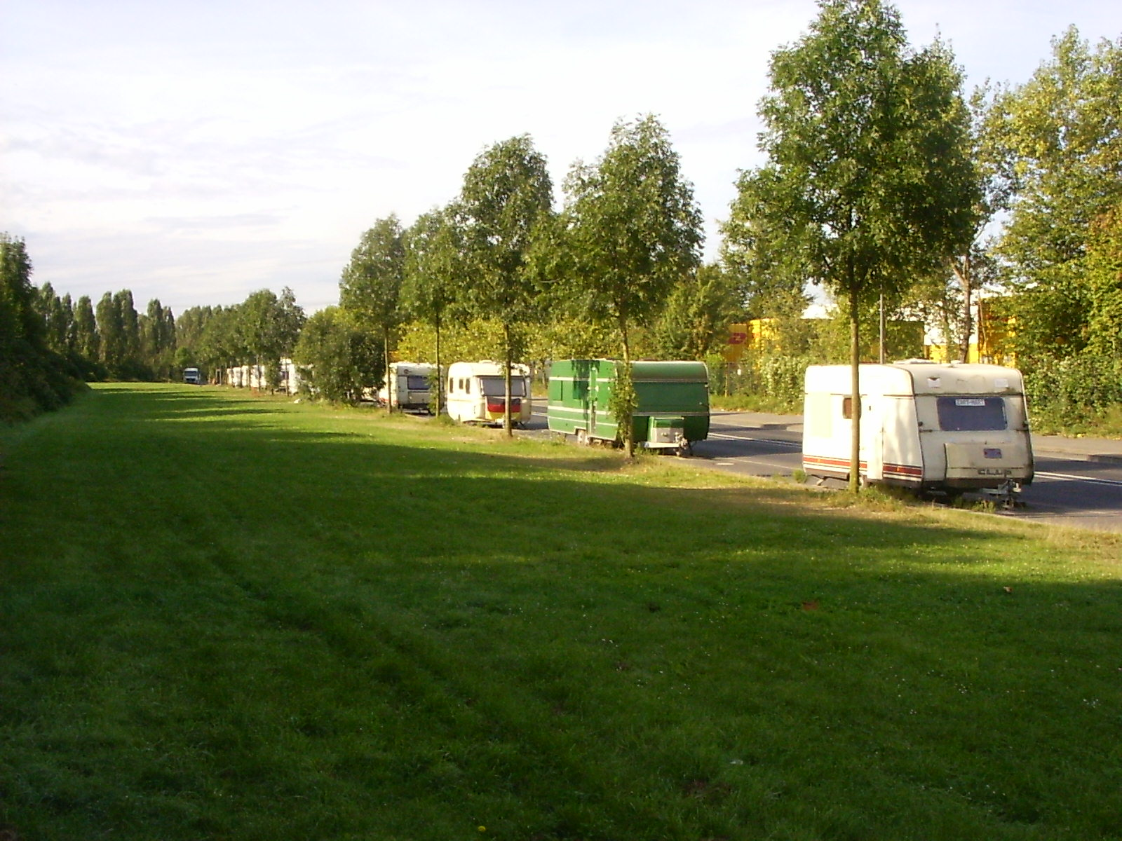 Wohnwagenstrich, am Eifeltor, Köln